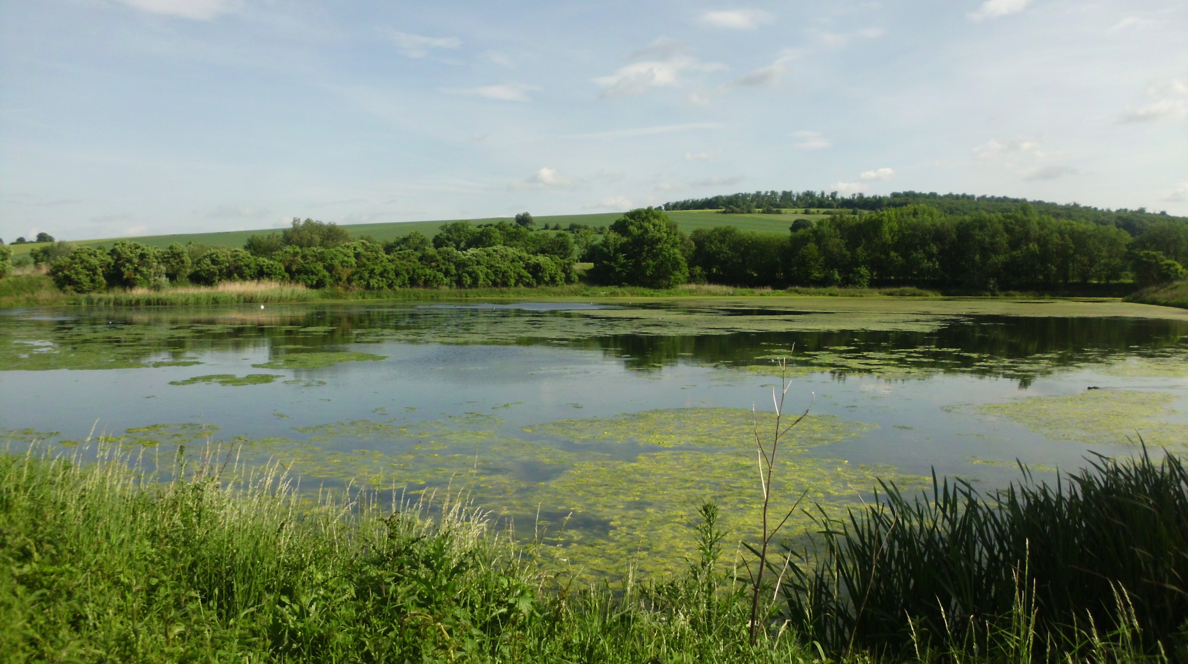 Einer der Klärteiche bei Baddeckenstedt im NSG Mittleres Innerstetal mit Kanstein, Landkreis Wolfenbüttel